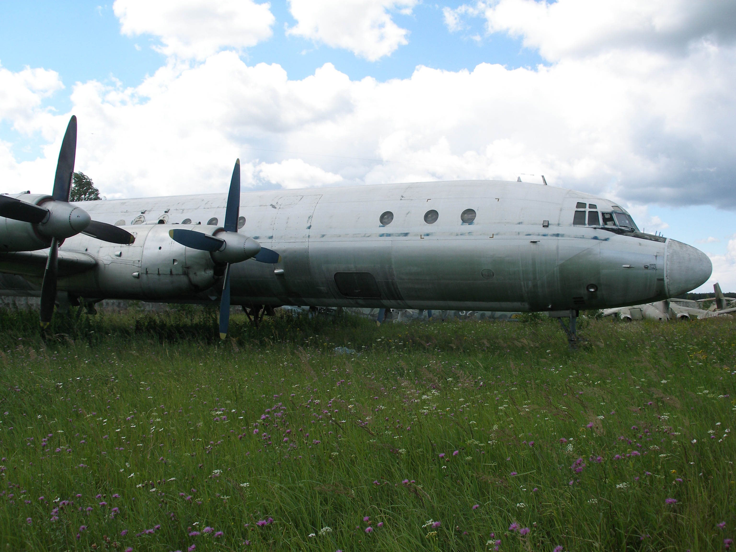 Ил-18В в Монино. Ранее самолёт принадлежал ВВС. Самолёт Ил-18В (СССР-75737) представленный в экспозиции Музея авиации в Монино, эксплуатировался в Ленинградском объединённом авиаотряде. Оттуда и прилетел и совершил посадку на территории Музея. Если интересуют подробности перелёта, могу сообщить, т.к. перелёт был уникален, его выполнял один из самых опытных экипажей.